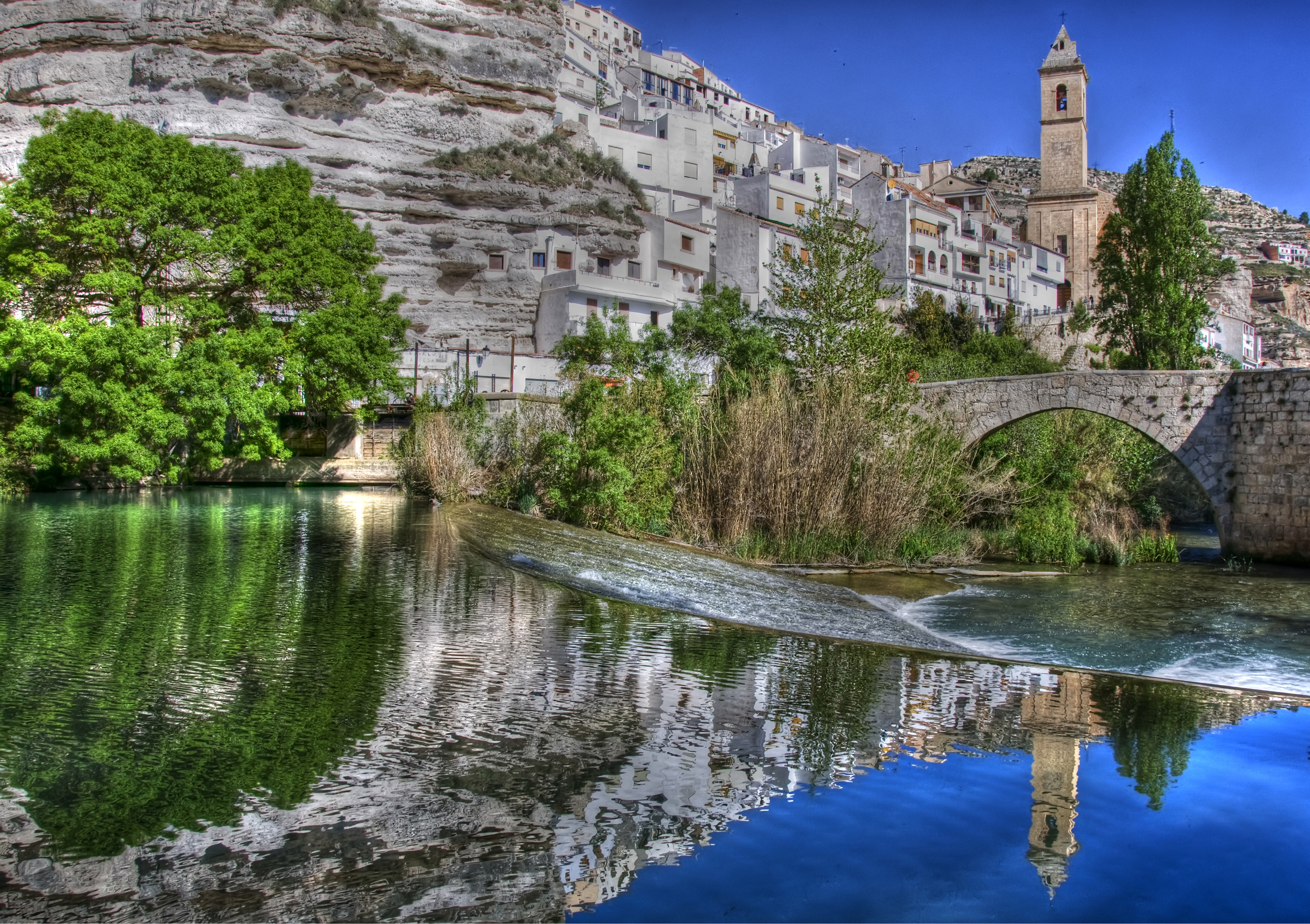 Hoces del río Júcar This is a photography of a Special Area of Conservation in Spain with the ID: ES4210001. Natura2000 entry, EEA entry